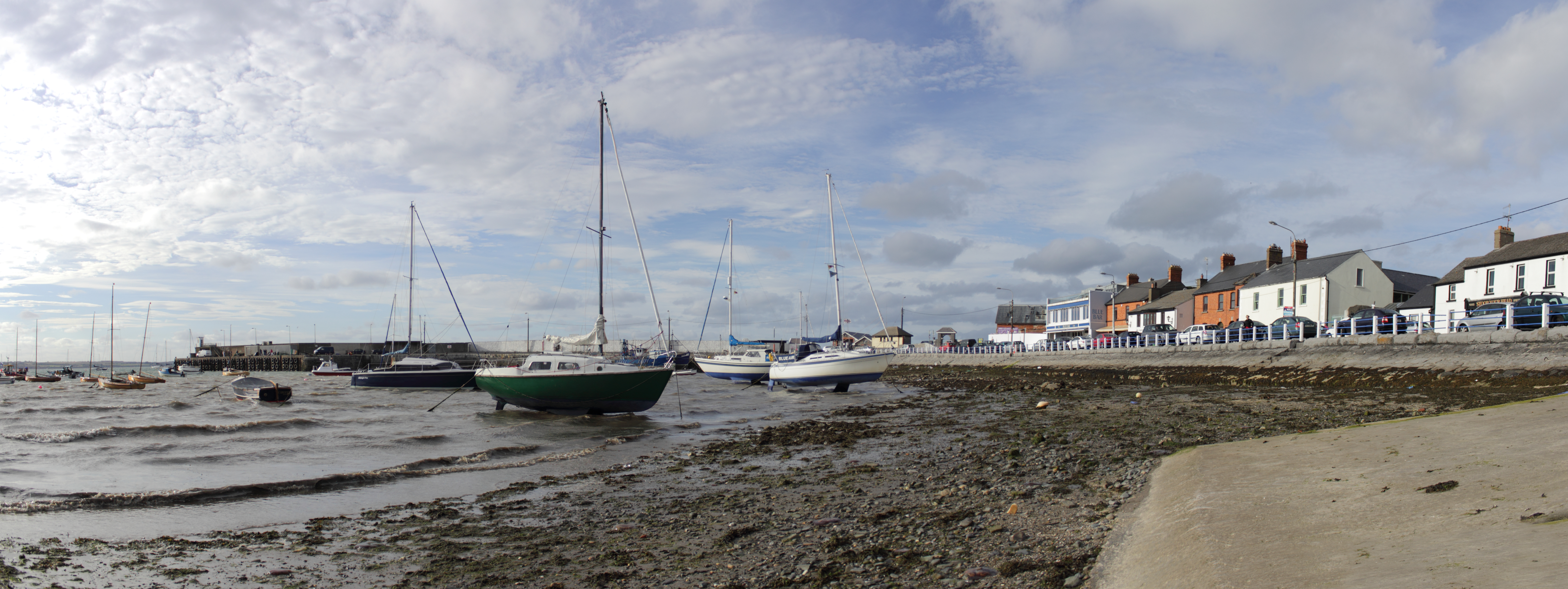 Port de Skerries, Irlande, 3 photo assemblées avec Hugin